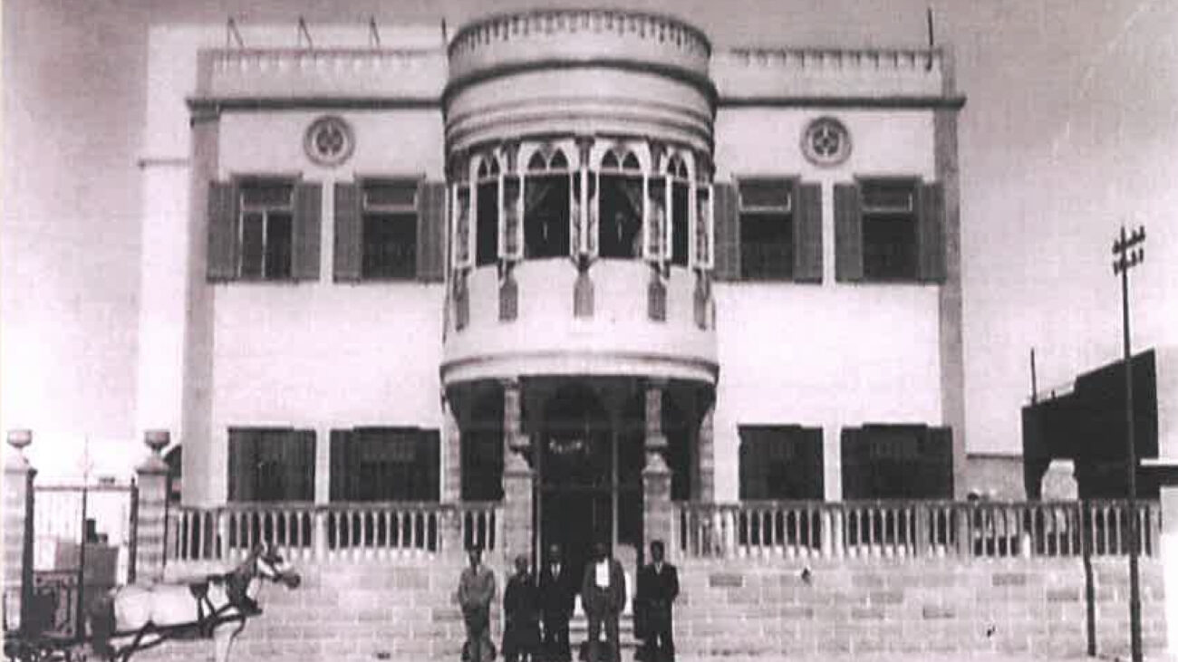 בית זיפטה